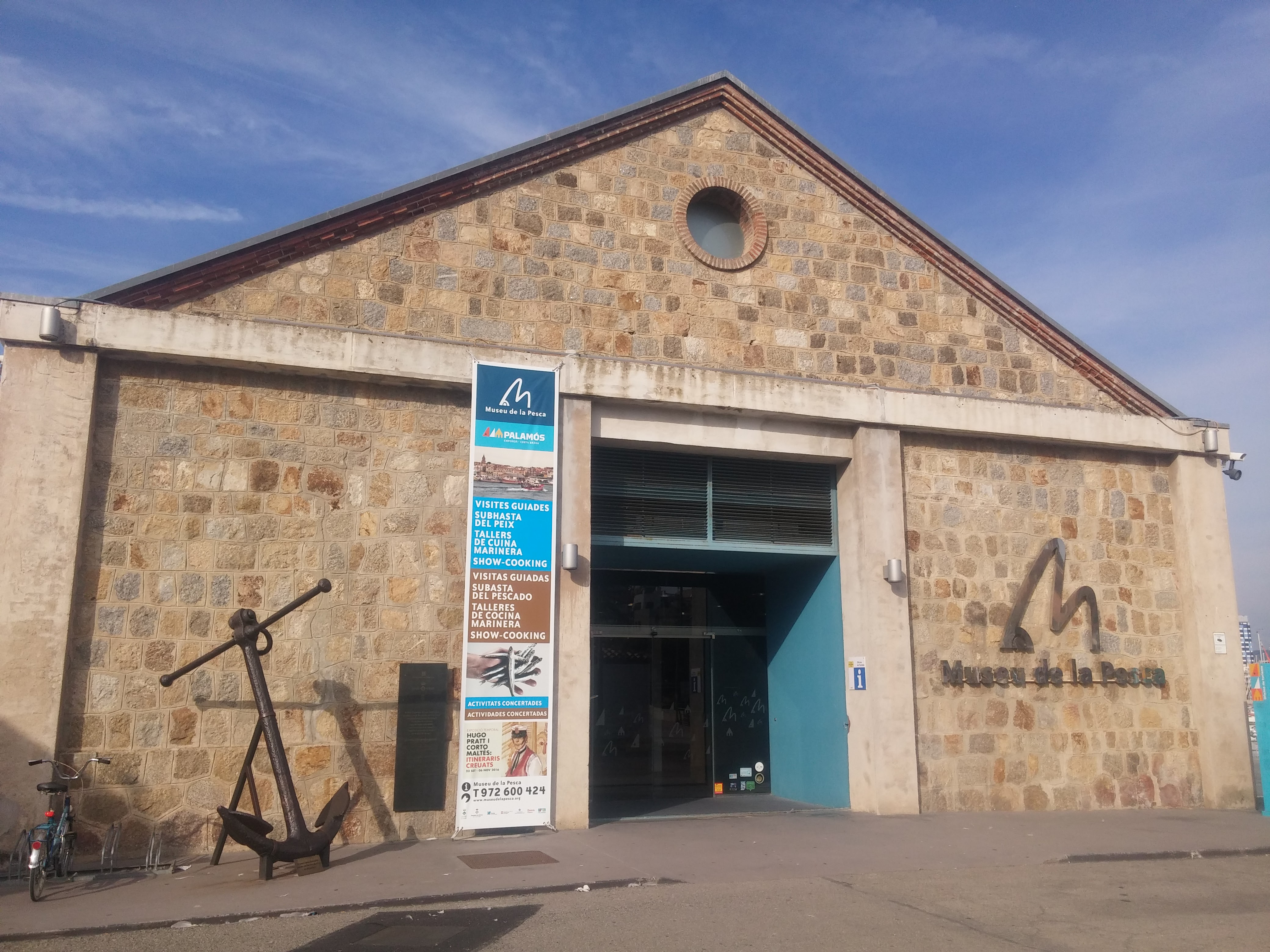 Façana del mòdul expositiu del Museu de la Pesca. Palamós